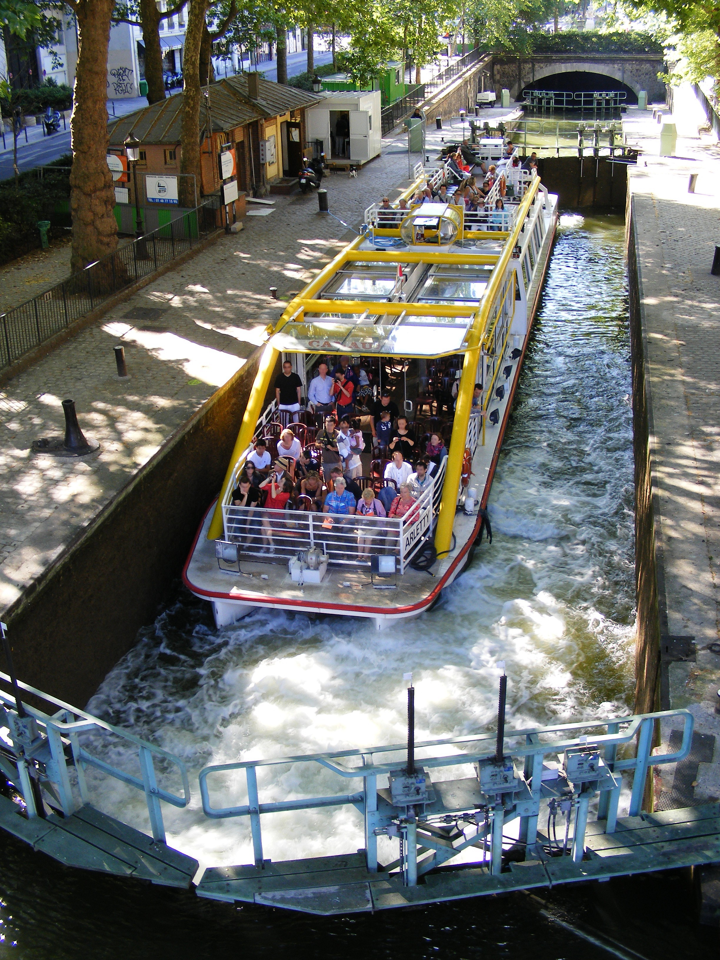 Bateau Promenade dans l'Ecluse du Temple sur le Canal Saint-Martin à Paris